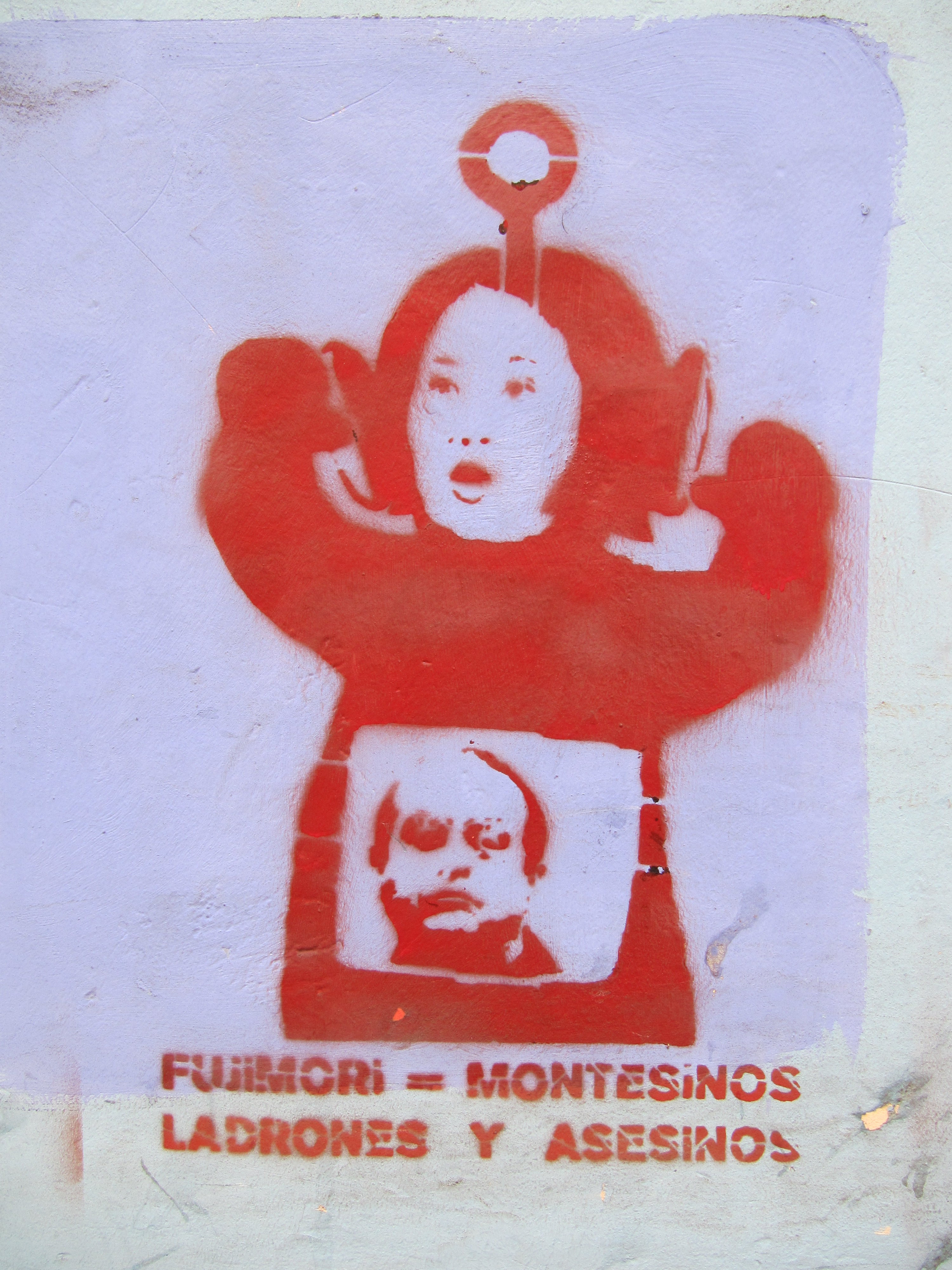 Keiko Fujimori Graffiti Vladimiro Montesinos